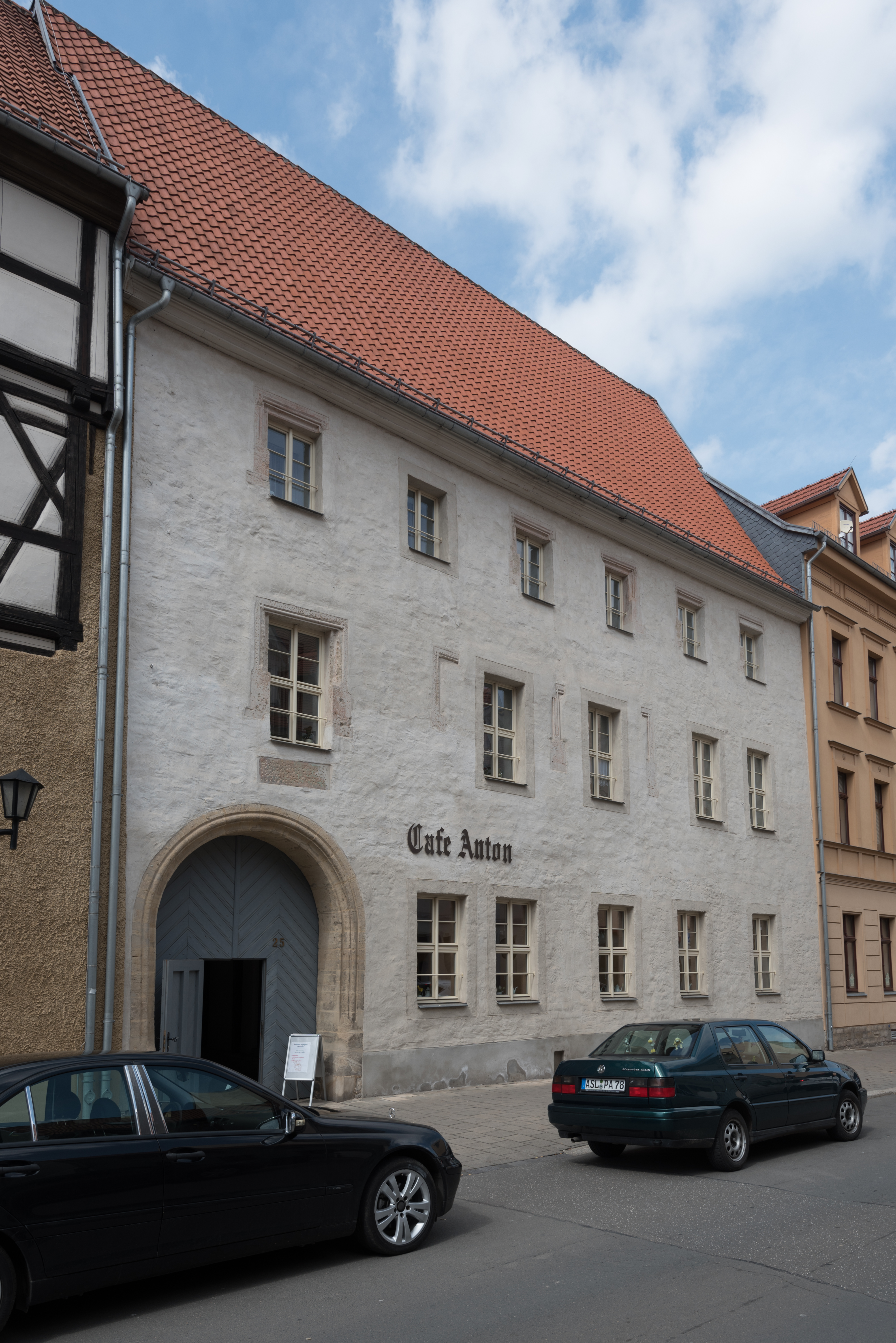 Aschersleben, Tie 25